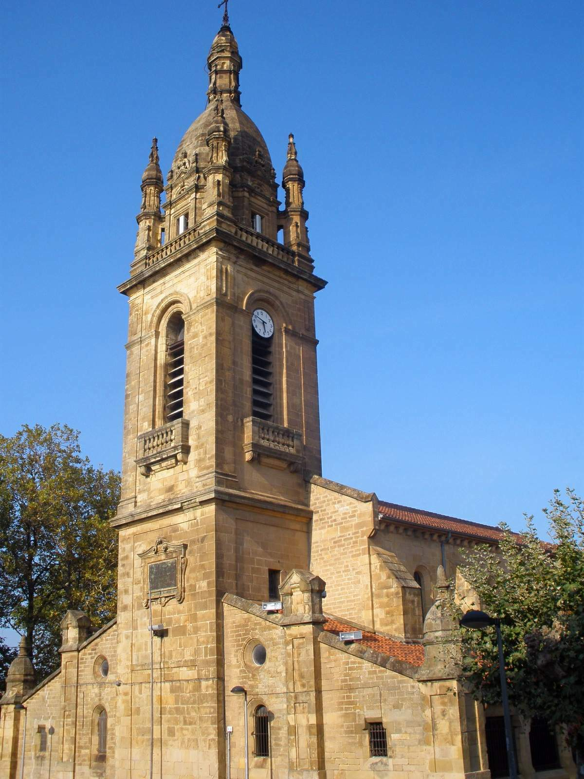 Church of Santo Domingo de Guzmán, Berango (Biscay)